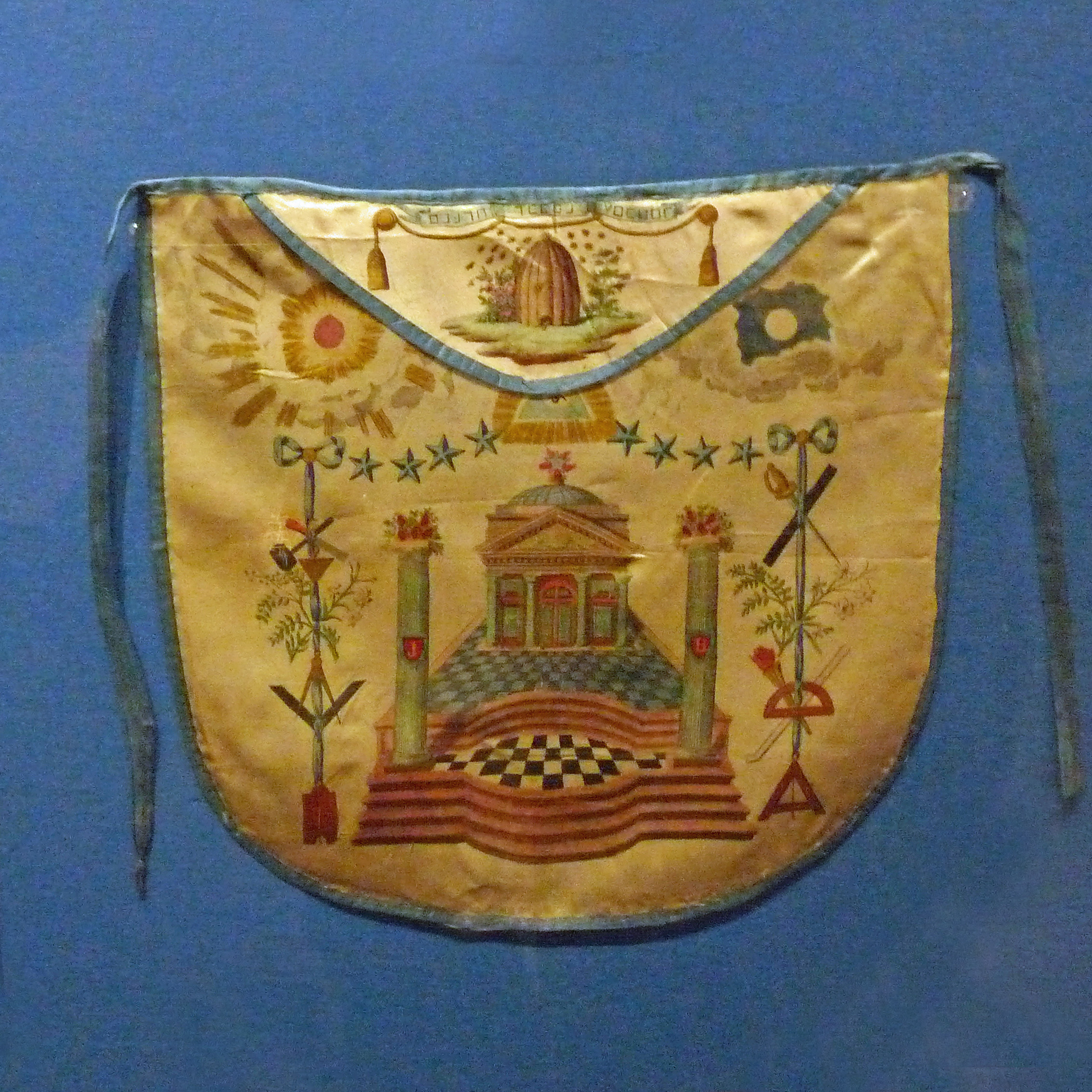 Franc-maçonnerie à Strasbourg : tablier de maître brodé (19e s.)